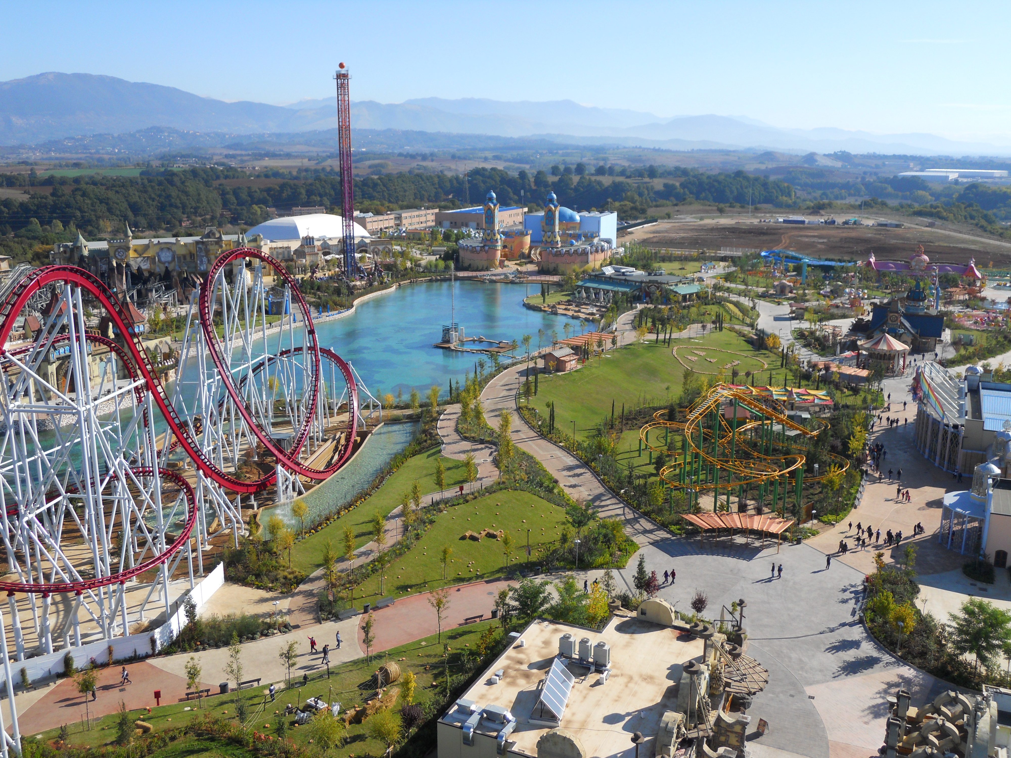 Lo Sky Shuttle del parco.